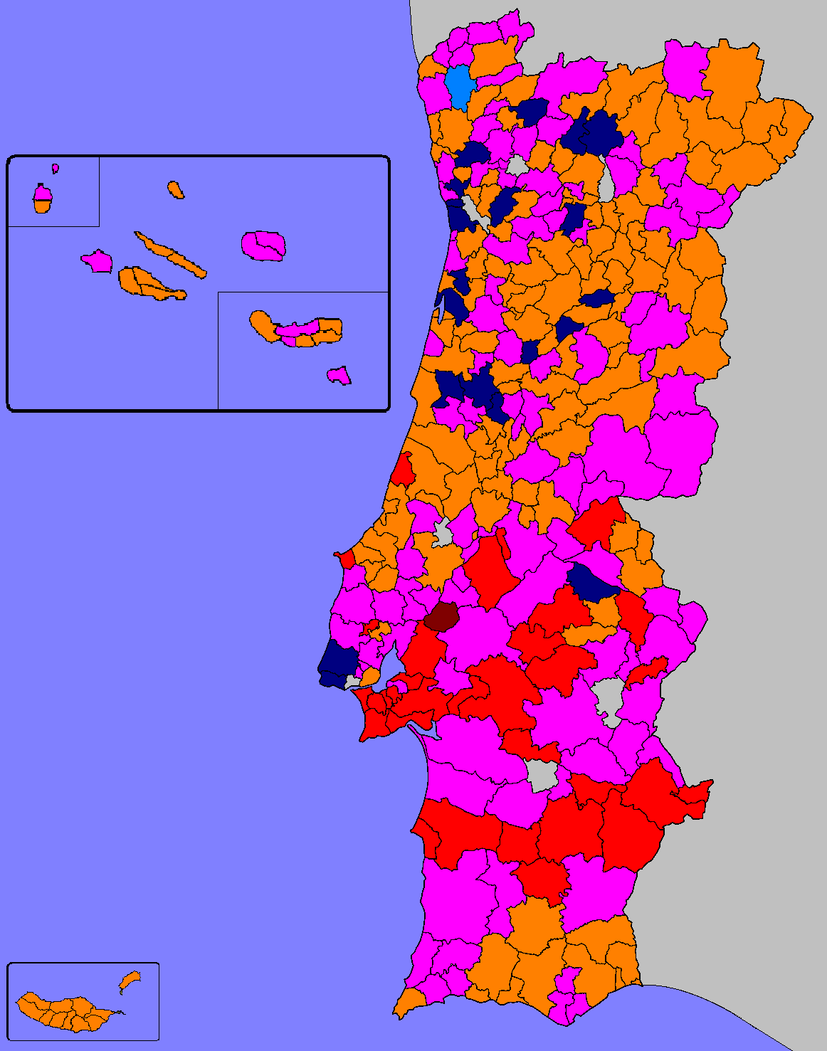 Mapa ilustrativo do partido mais votado por Concelho (Câmara Municipal)